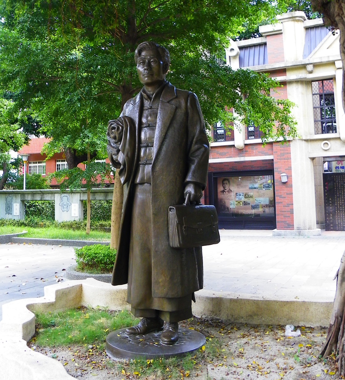 臺北市大同區錦西街蔣渭水紀念公園榕蔭下的蔣渭水銅像，蒲浩明作品，2011年10月17日揭幕。